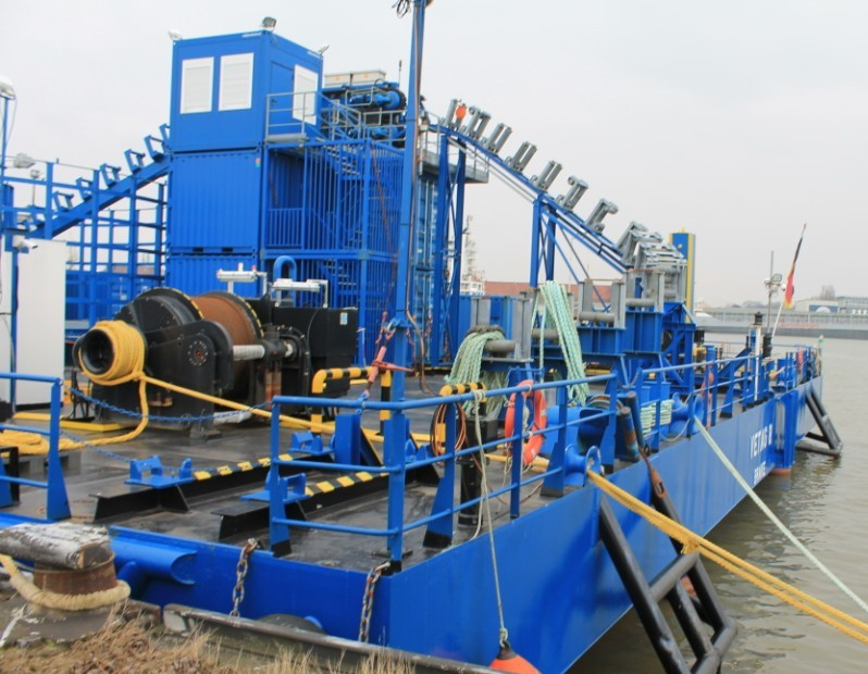 Die Vetag 8 in Bremerhaven